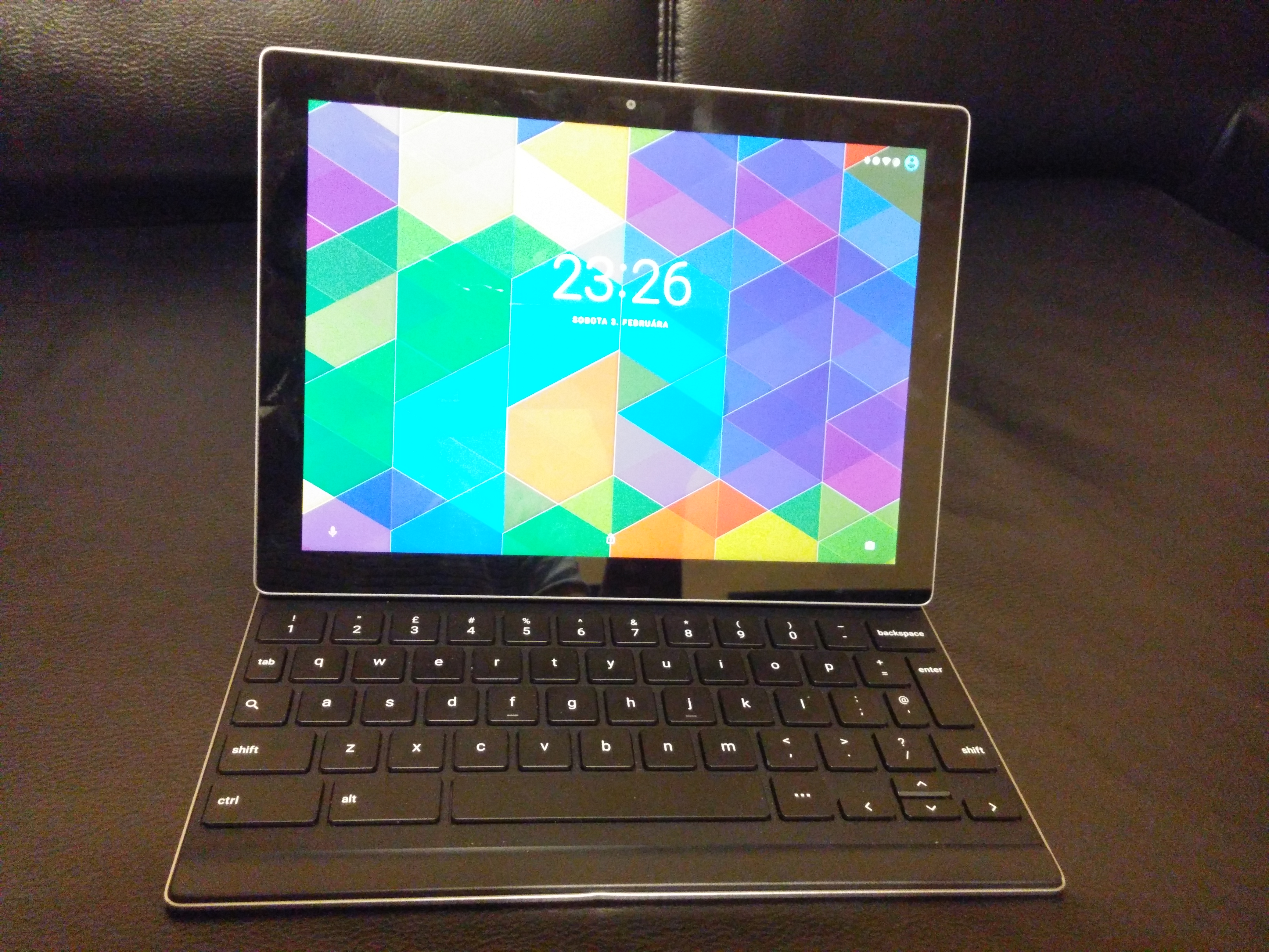 Pixel C keyboard